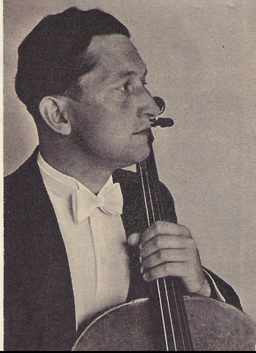 Bild Hermann von Beckerath